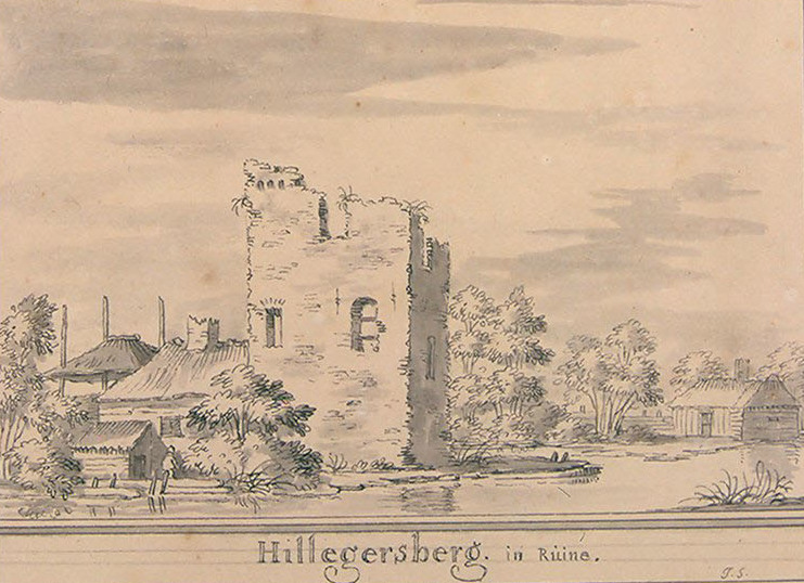 Beschrijving en Afbeelding der Steeden Dorpen Gehugten Aadelijke En Andere Gebouwen In Zuijt Holland en Aankleving van Dien Meest naat leeven getekeent. en Naat A.B.C. gelegt Dus Beschreeven en bij een Versaamelt Door Andries Schoemaker 1730